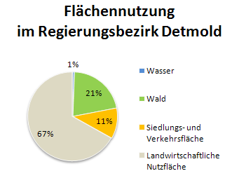 Flächennutzung im Regierungsbezirk Detmold (OWL)